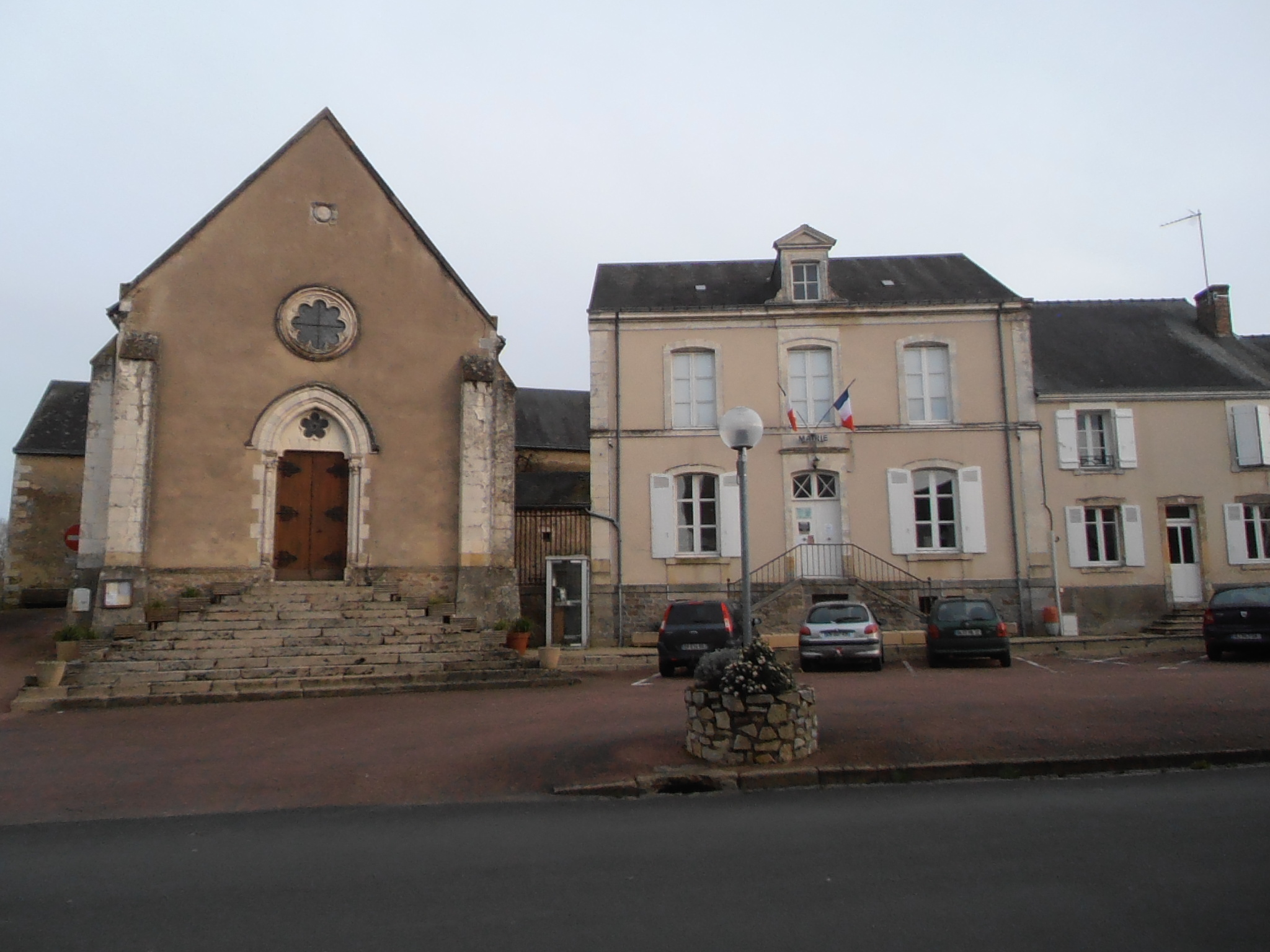 La place Saint Aubin au centre du village, l'église et la mairie